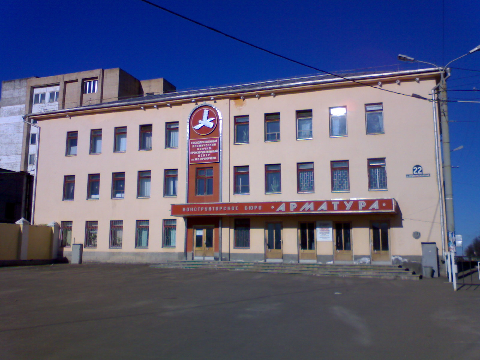 КБ "Арматура"